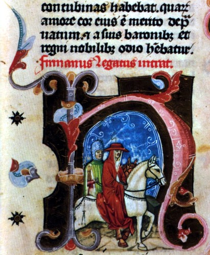 Fülöp fermói püspök a Képes Krónikában